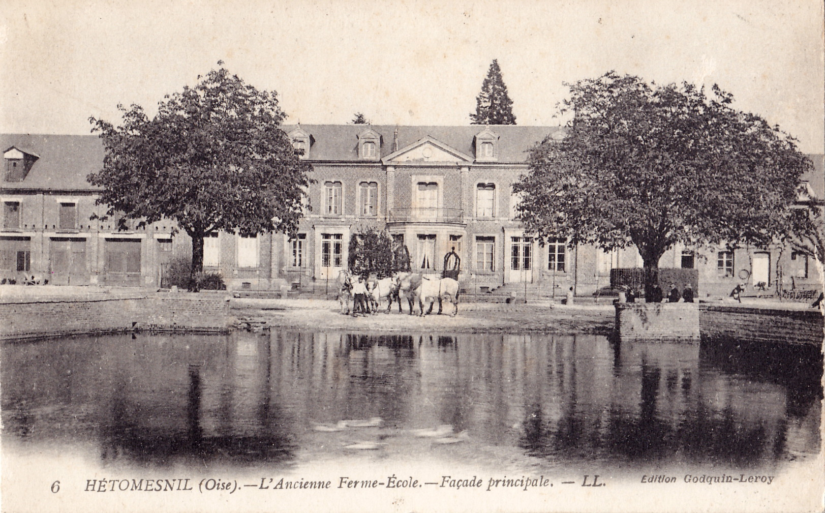 Carte postale ancienne éditée par Godquin-Leroy LL n°6 : HETOMESNIL - L'Ancienne Ferme-Ecole - Façade principale